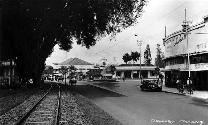 Foto. De stoomtram over de Tjelaket in Malang, Oost-Java.